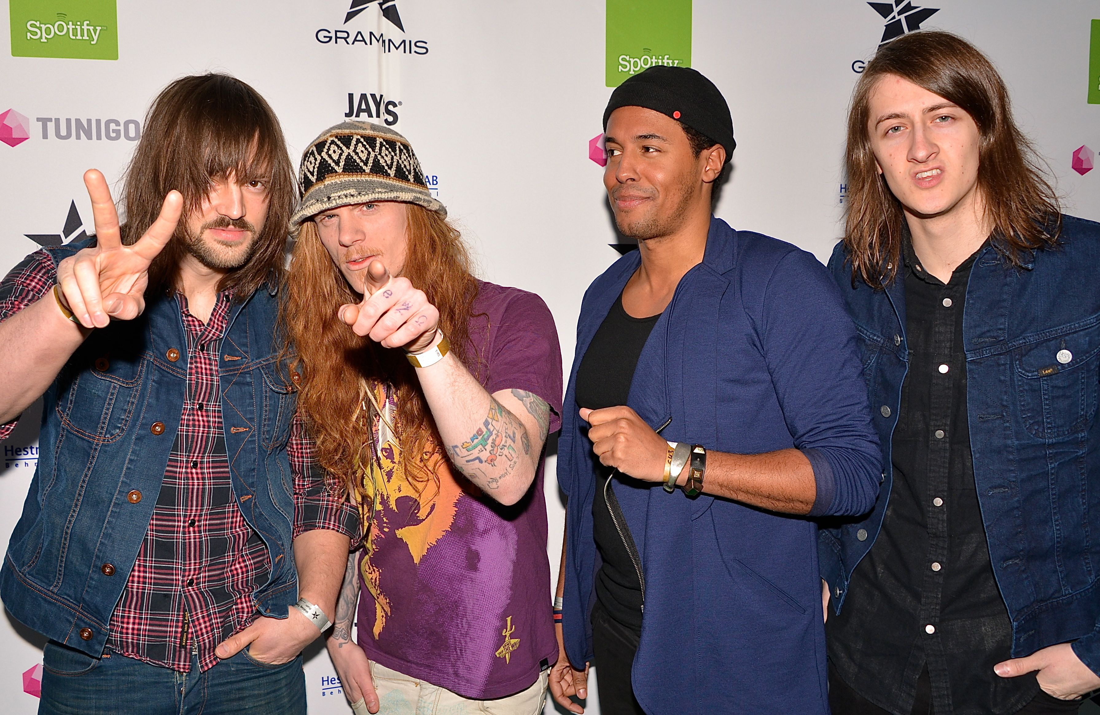 Witchcraft på Grammisgalan på Cirkus i Stockholm den 20 februari 2013.